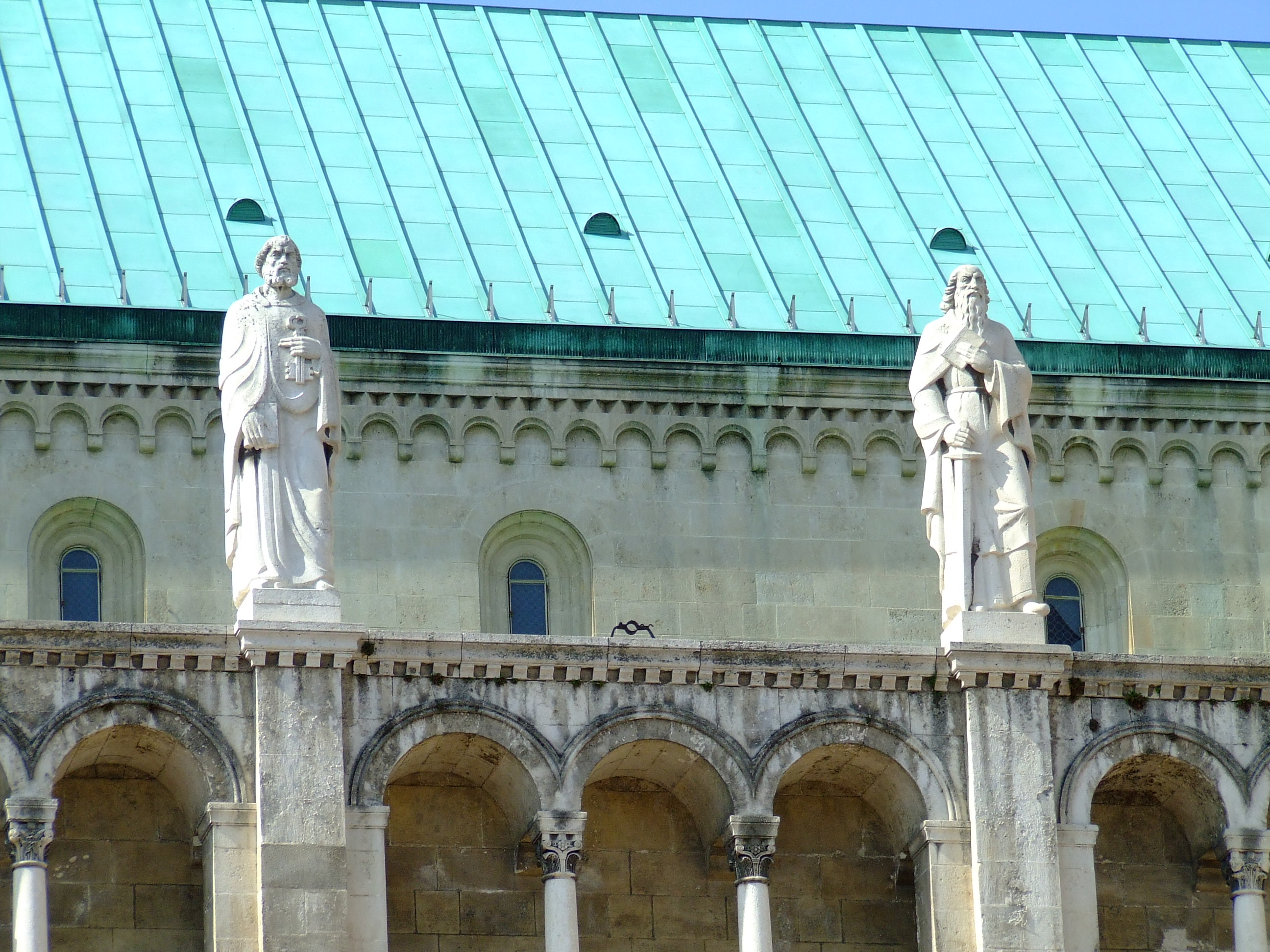 Apostolszobrok a pécsi székesegyház oromzatán. Az összesen tizenkét apostolszobrot Antal Károly szobrászművész 1940 és 1963 között készítette This is a photo of a monument in Hungary, Identifier: 1796